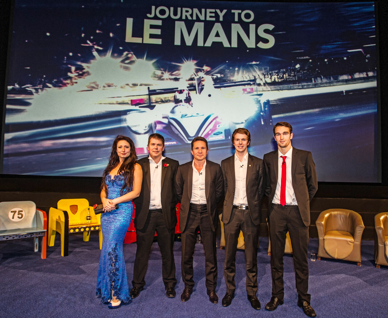 Charlotte Fantelli Journey to Le Mans premiere, Vue cinema Leicester Square